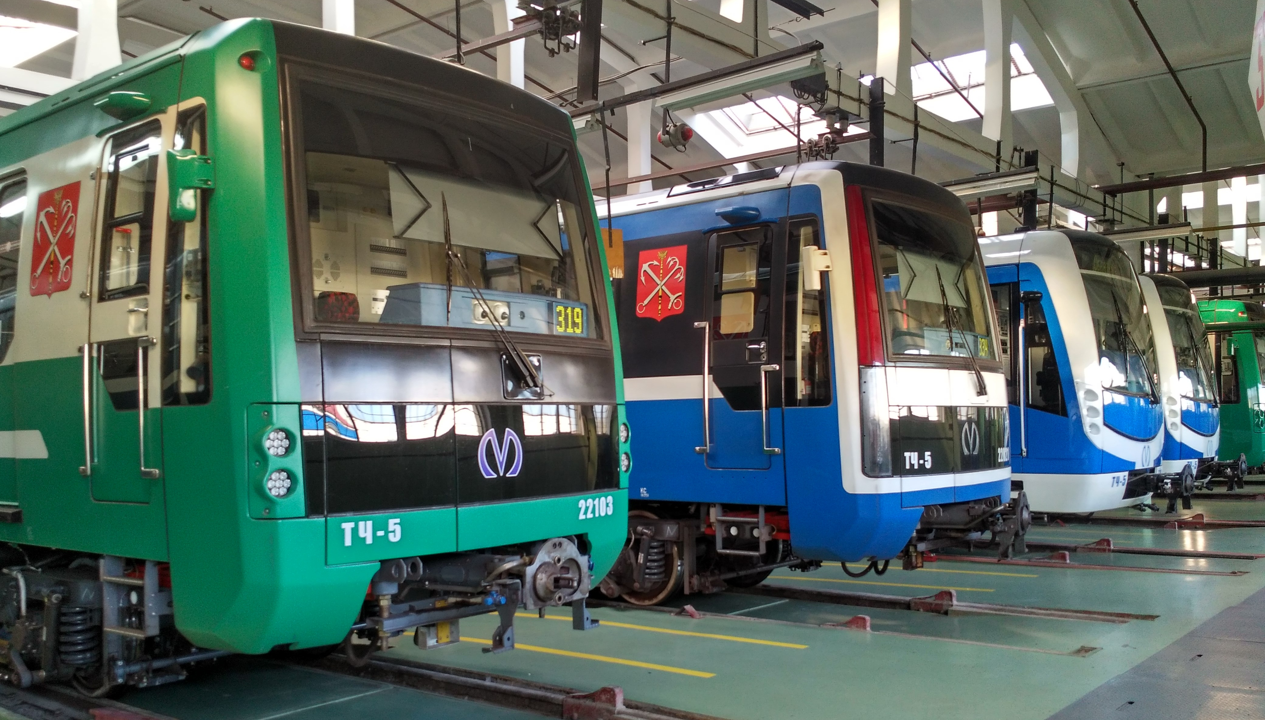 Вагоны типа Юбилейный и НеВа в электродепо Невское (весна 2018). Слева направо: 81-722.3 (22103) 81-722 (22021) 81-556 (56009) 81-556.1 (56027)